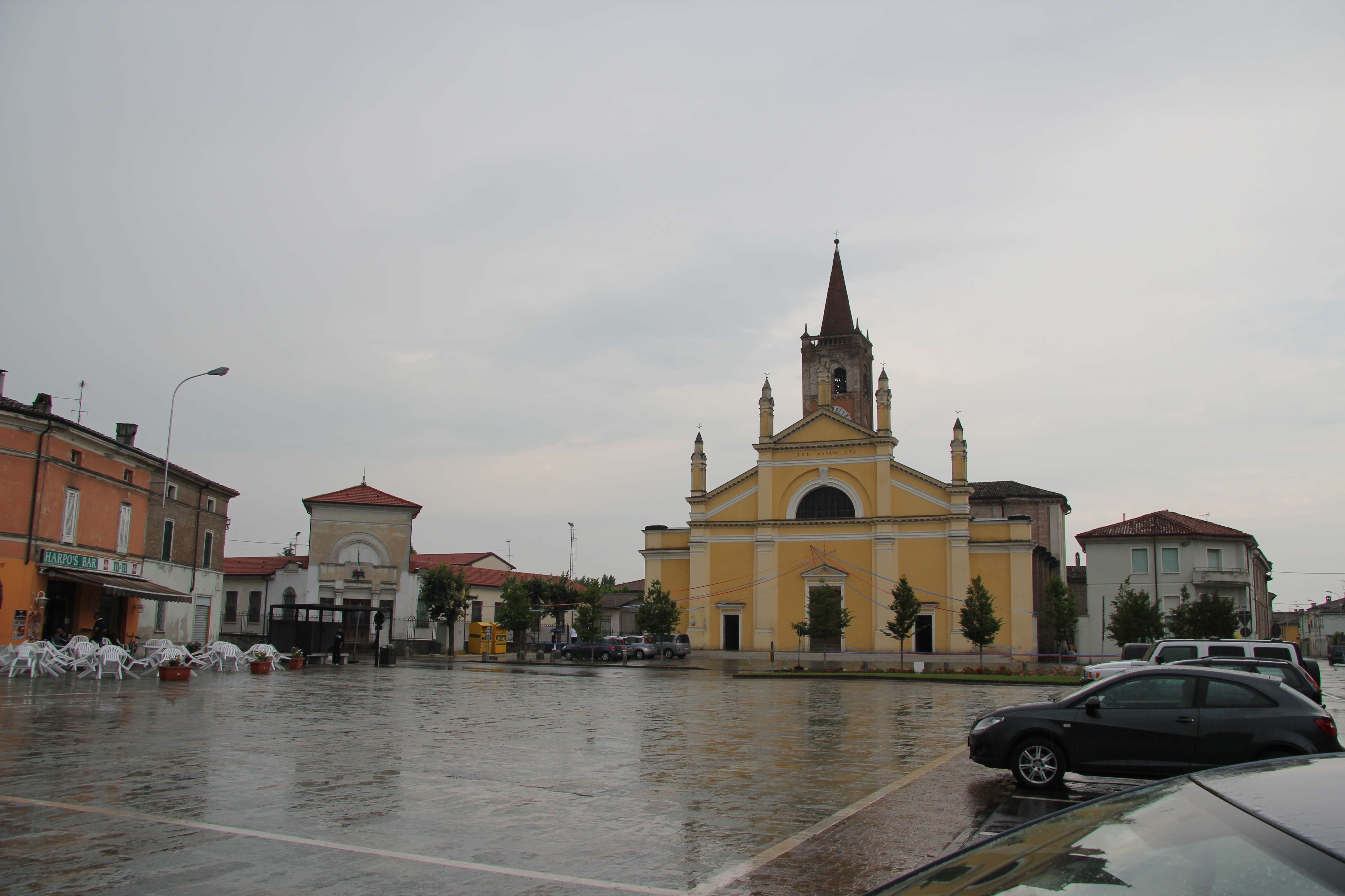 Piazza principale di Gussola (Cremona). Italy